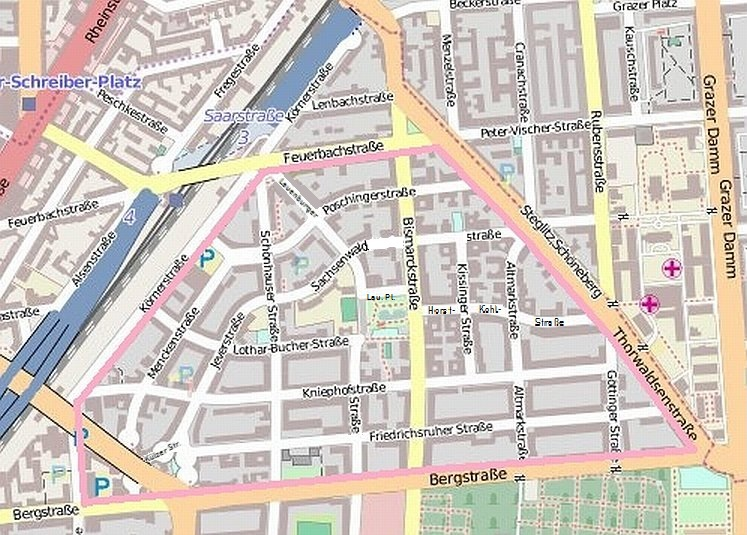 Straßennamen ergänzt